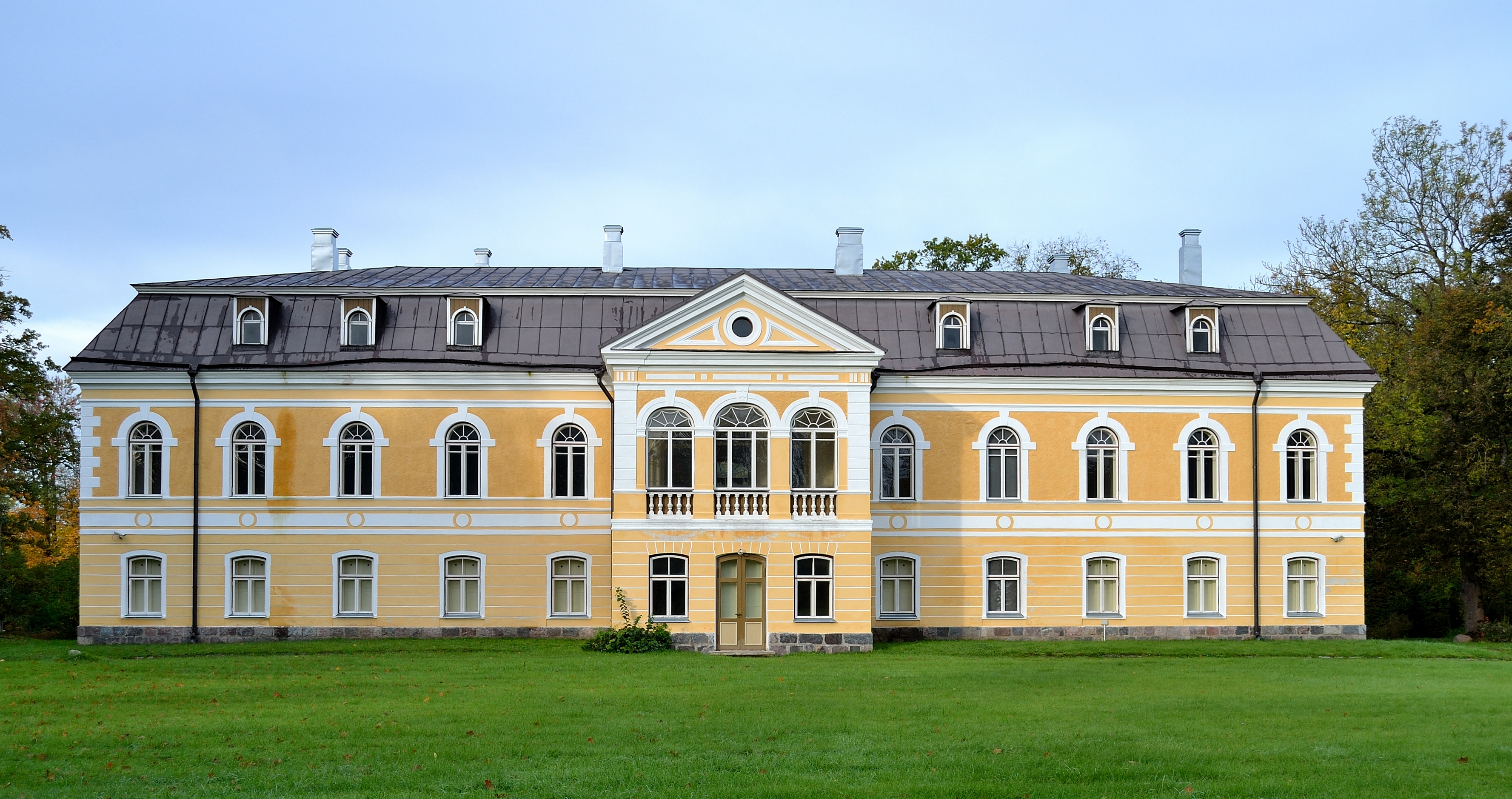 Kehtna mõisa peahoone